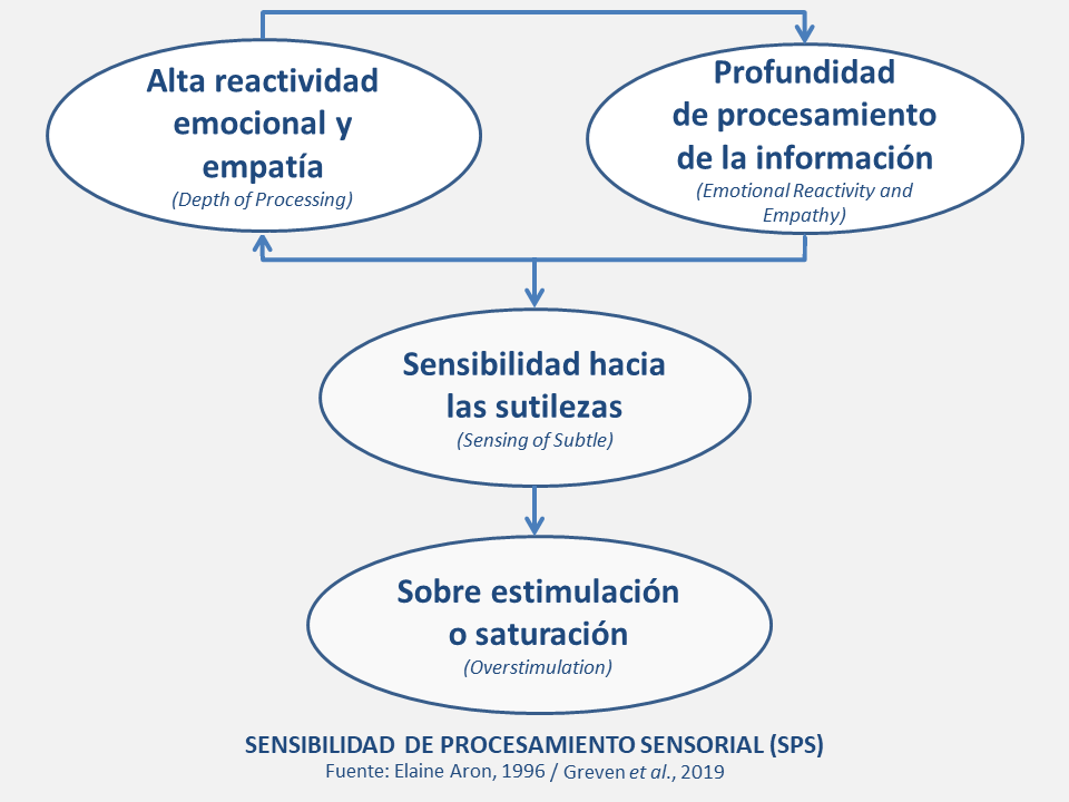 Diagrama de 4 pilares fundamentales en las personas PAS